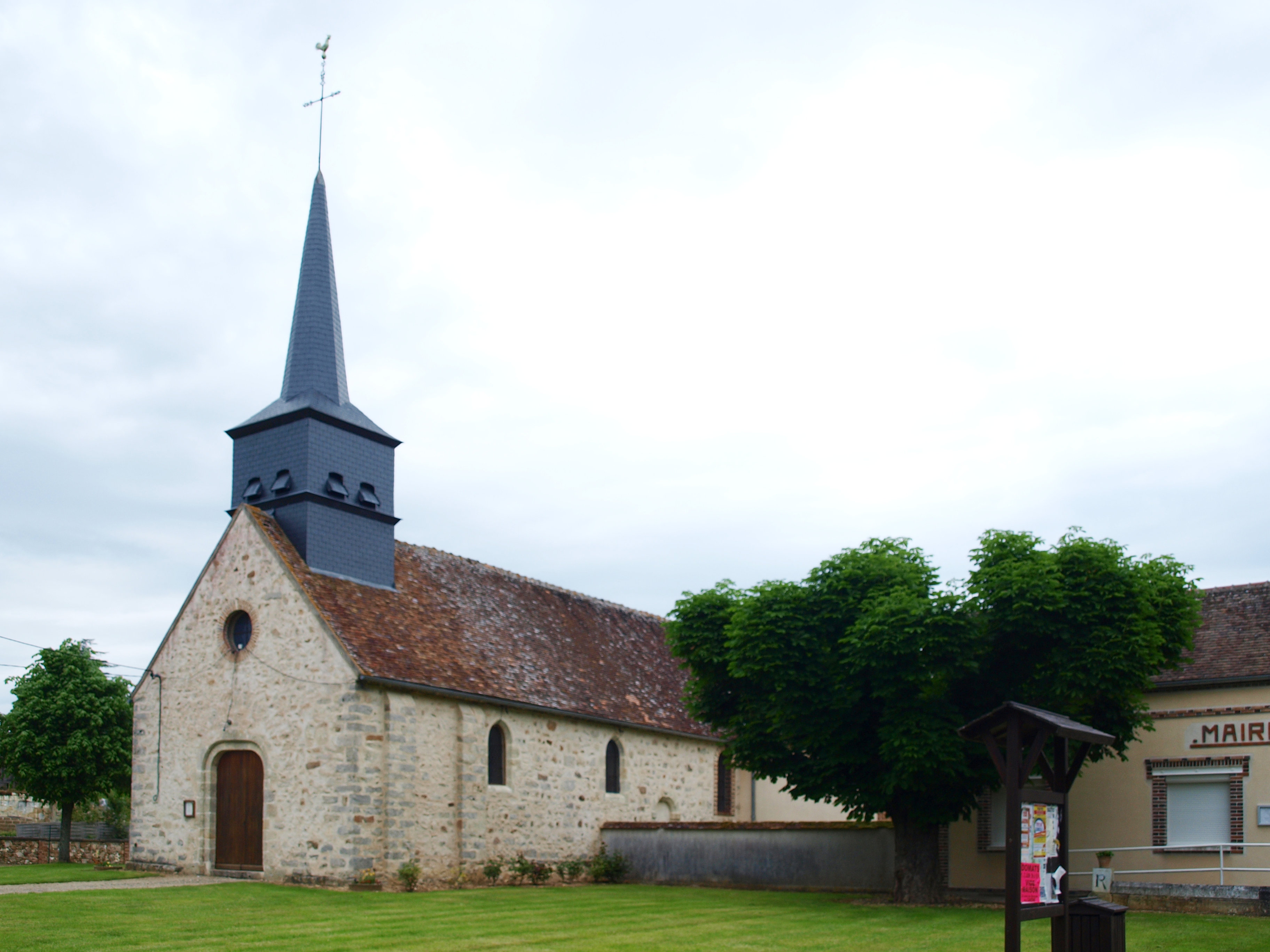 La Belliole (Yonne, France)